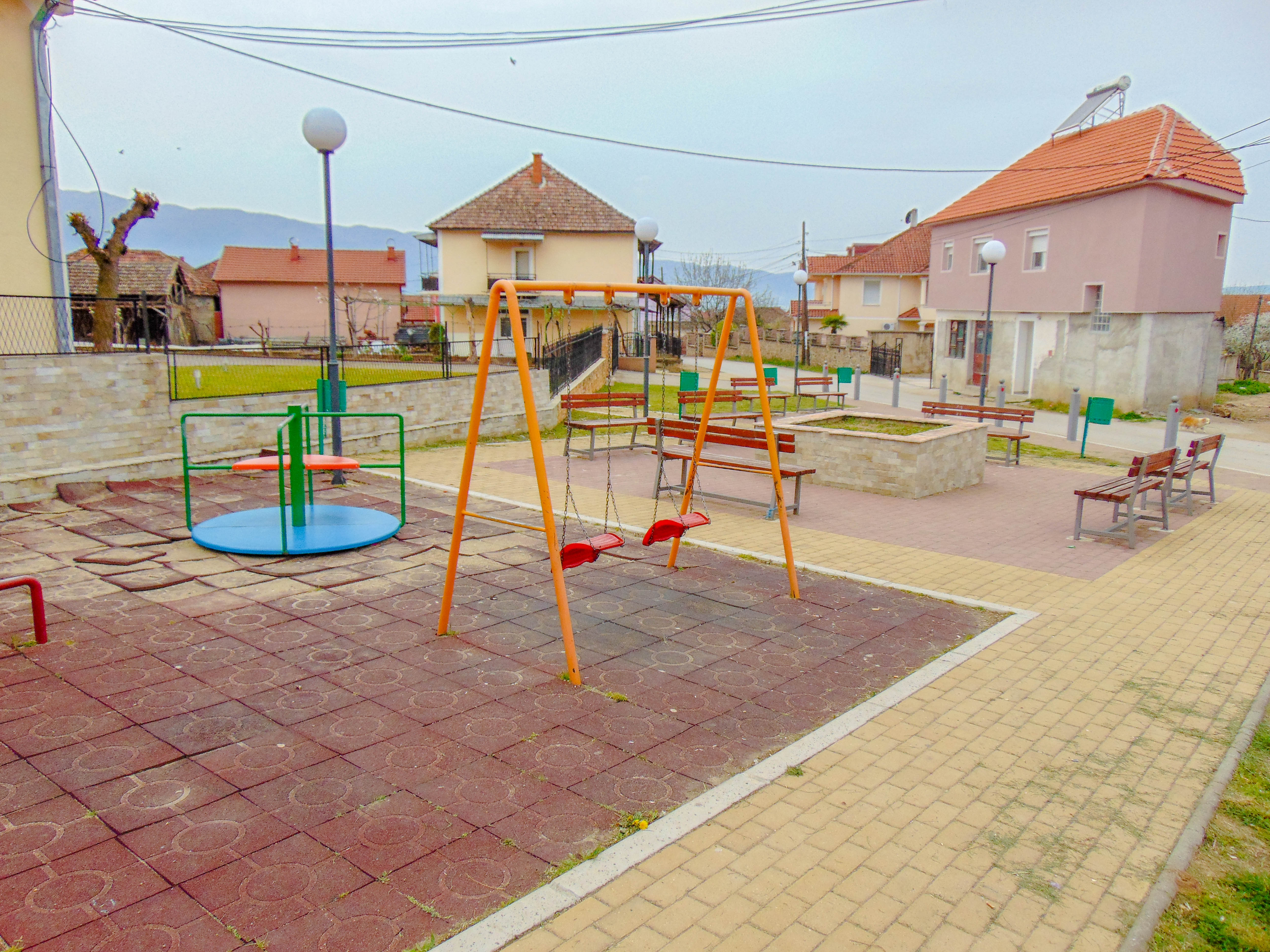 Детски парк